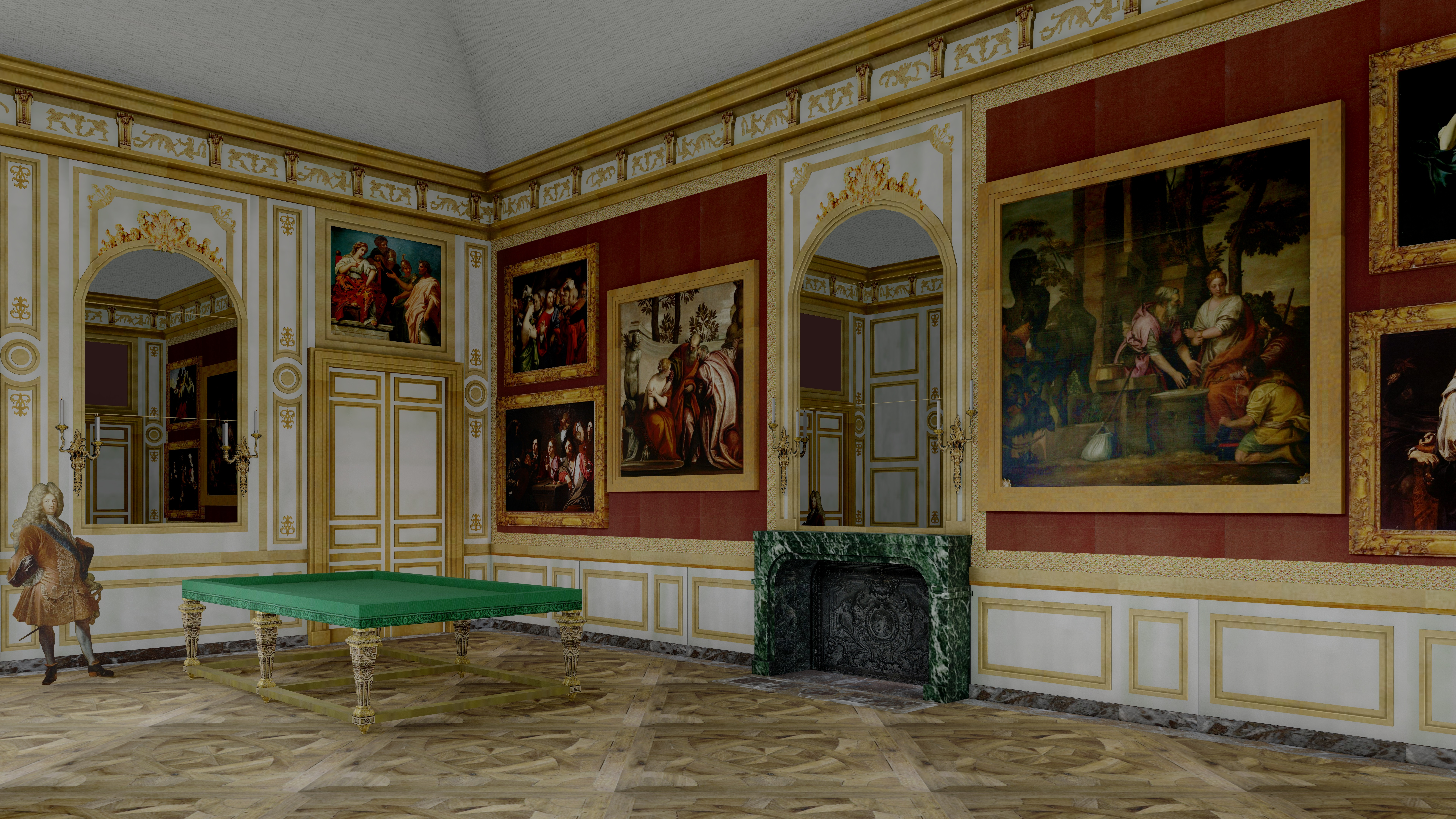 Essai de restitution du grand salon de l'aile des marronniers, vers 1705. Avec les tableaux placés par Monseigneur.